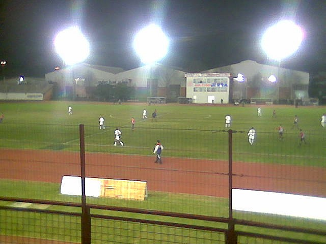 Jogo da Ulbra Série C do brasileirão